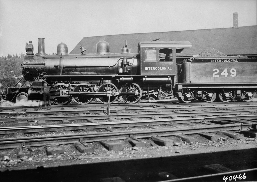 Locomotive à vapeur no 249 du chemin de fer Intercolonial qui desservait les provinces maritimes du Canada.